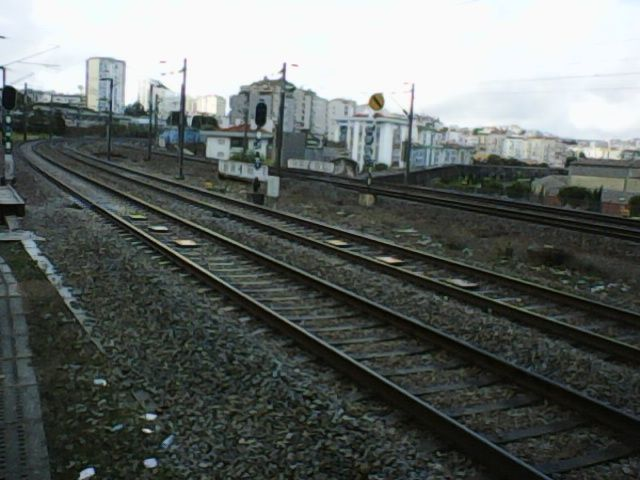 Vista da estação da Reboleira para as vias (direção:Sintra), vendo-se o atravessamento do Aqueduto das Águas Livres